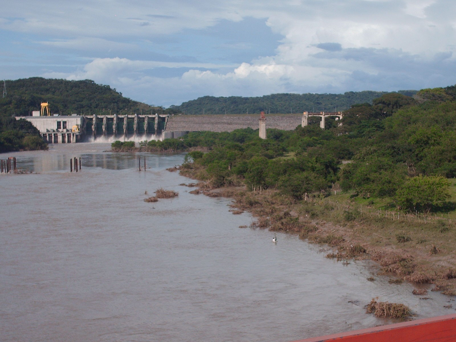 La Presa Hidroeléctrica 15 de Septiembre, está ubicada sobre el Río Lempa, entre los Departamentos de San Vicente y Usulután. A la fecha, se constituye en una de las dos fuentes de generación de electricidad a partir de energía hidráulica en El Salvador.